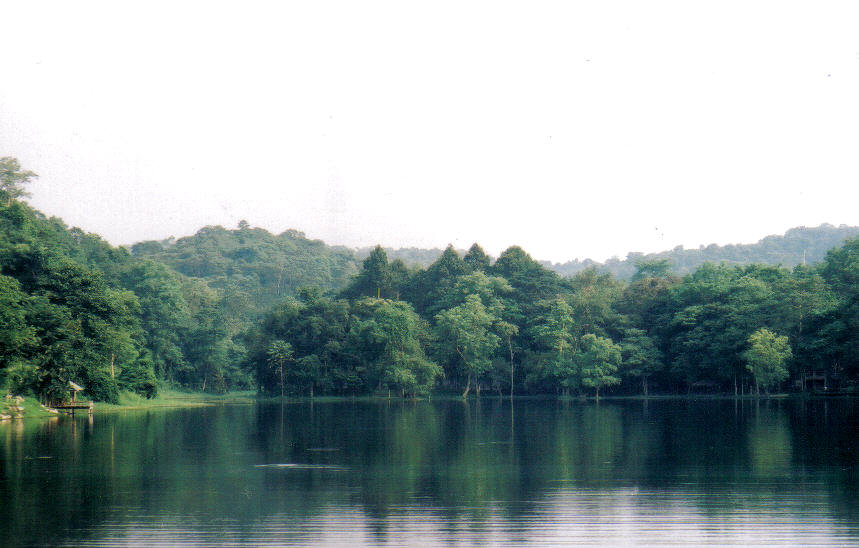 Phra Phuttha Chai National Park in Saraburi, Thailand